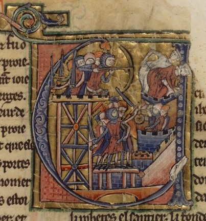 Siege of Jerusalem 1099